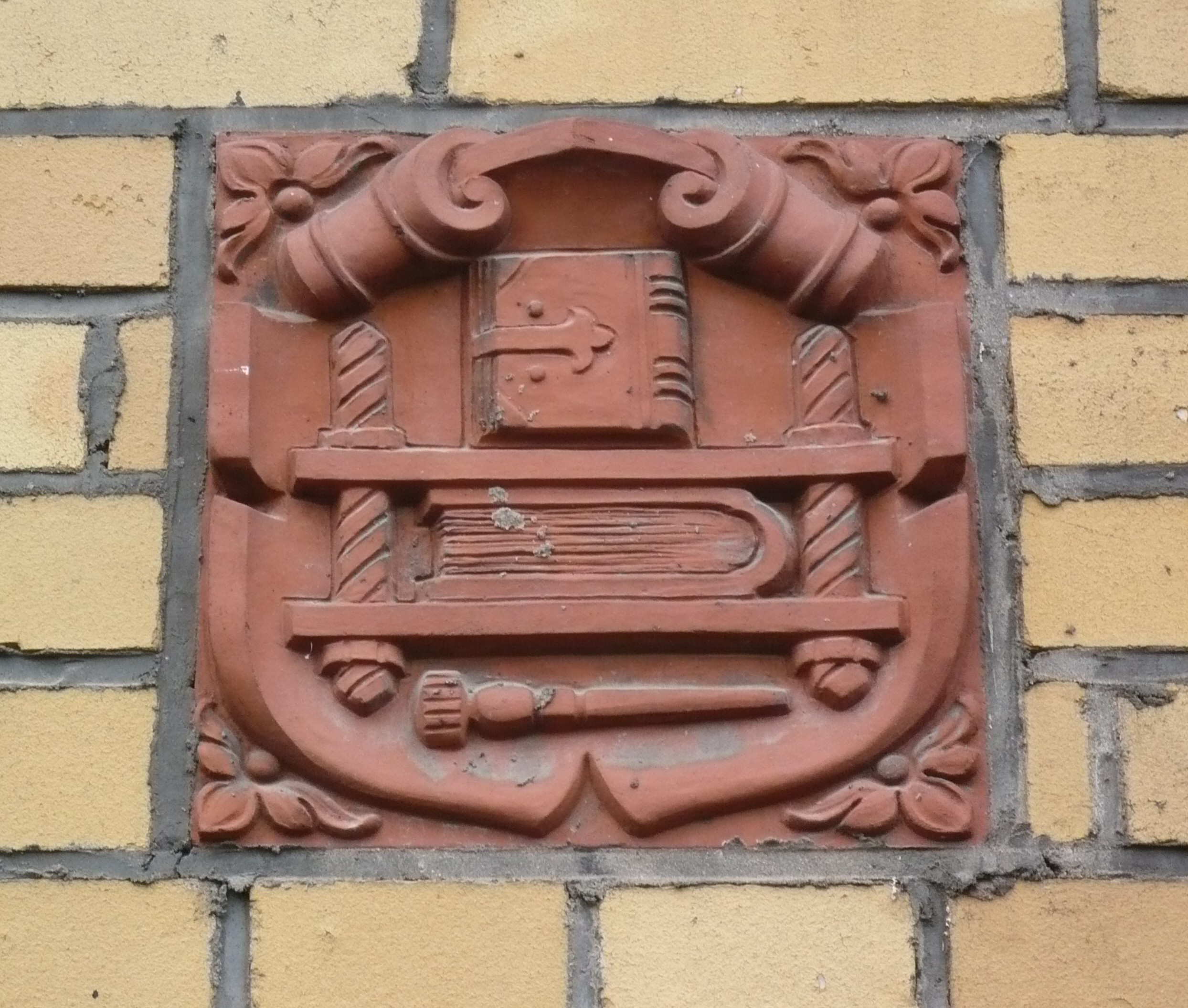 Kinderklinik Lindenhof in der Gotlindestr., Fassadenschmuck